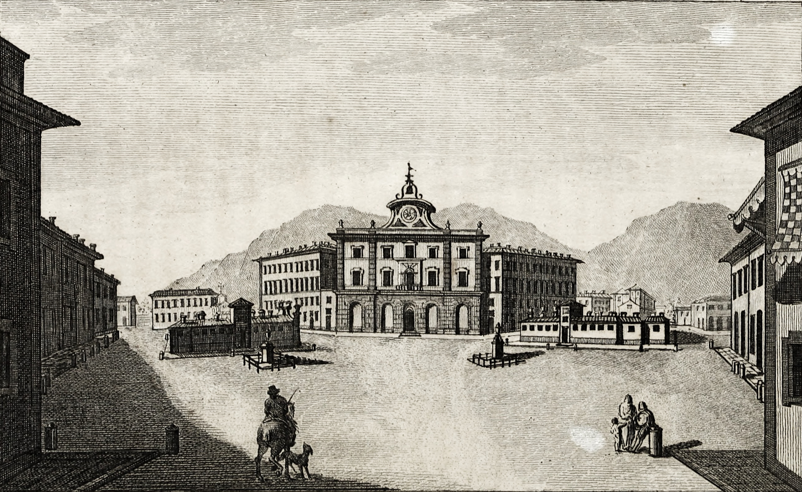 Illustrazione degli stabilimenti termali di San Giuliano Terme nel 1837.